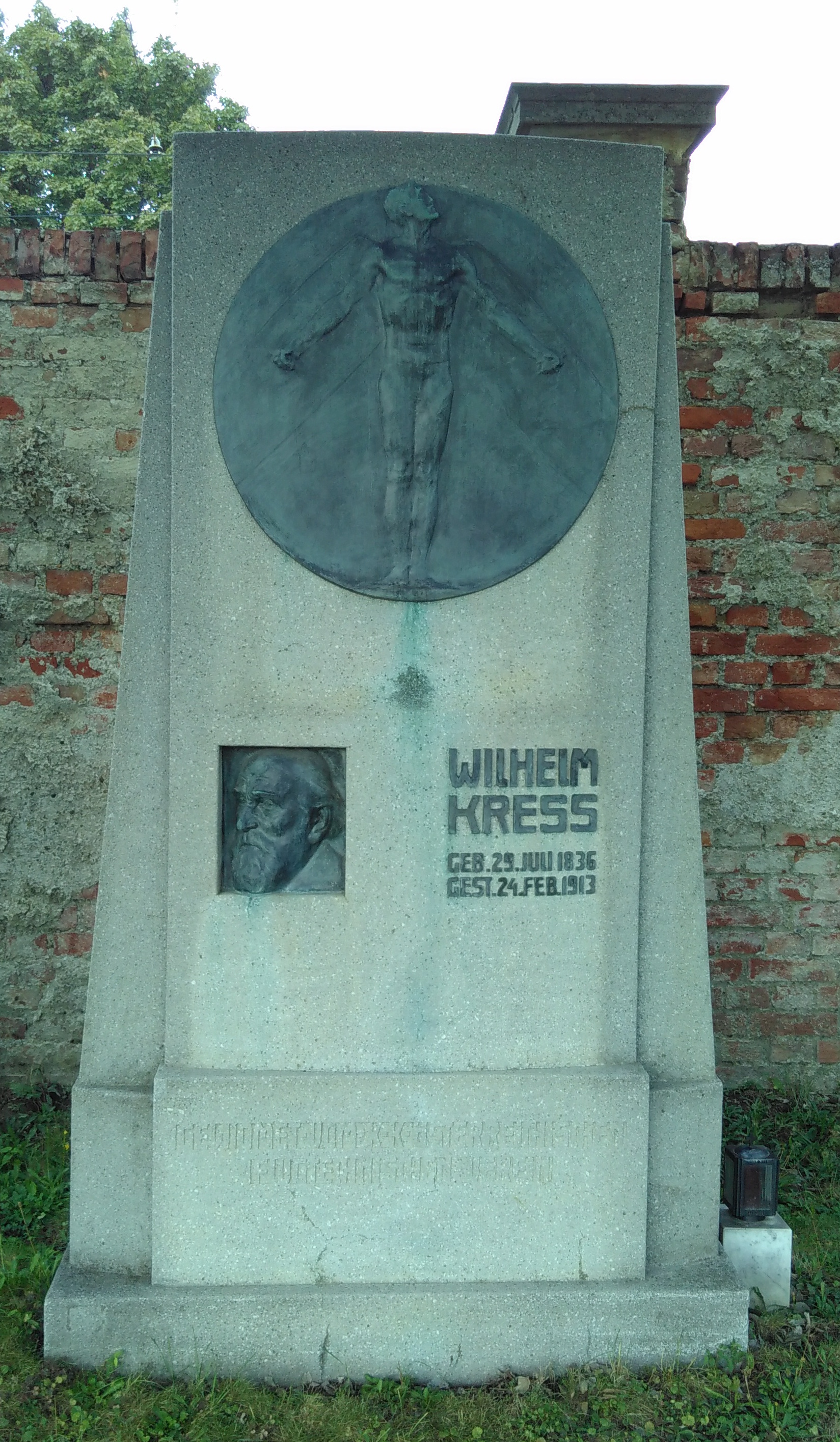 Ehrengrab des Flugpioniers Wilhem Kress am Wiener Zentralfriedhof, (Gruppe 0, Reihe 1, Nummer 65), gestaltet von Andreas Kögler (1878–1956).